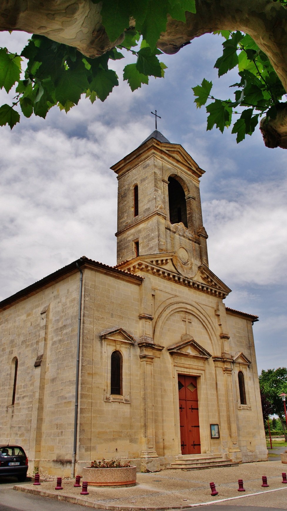 L'église